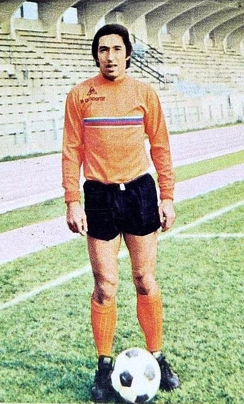 Jean Djorkaeff en 1973 (Paris FC), 'Ageducatifs 1973 - 1974', Panini figurina n°149.